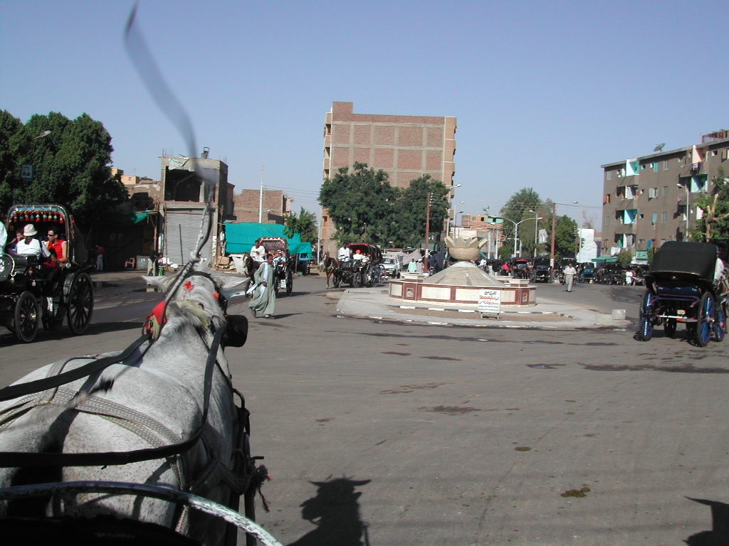 Edfu